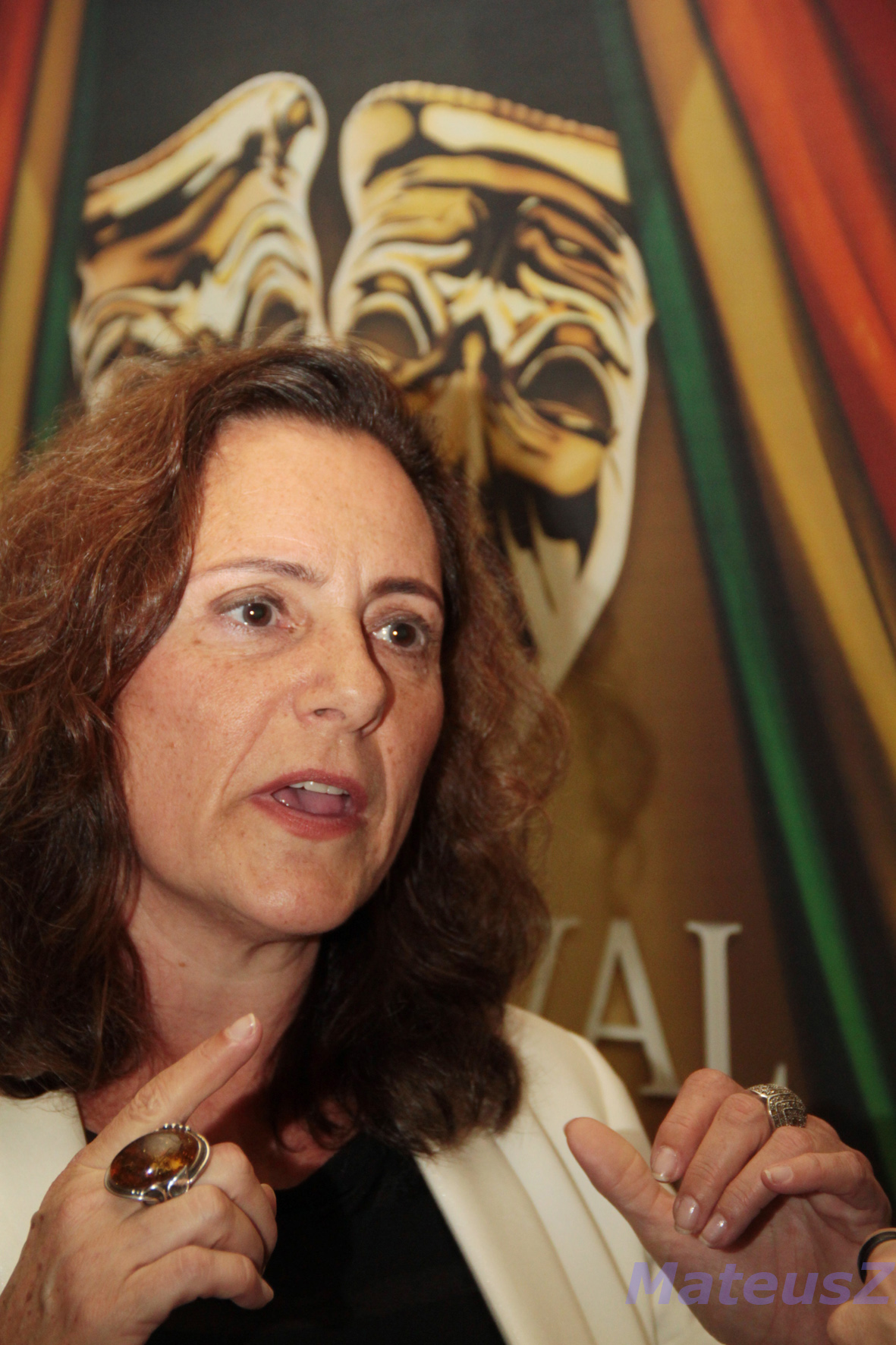 MateusZF 16-11-2010 Teatro Pedro II Savala (21)